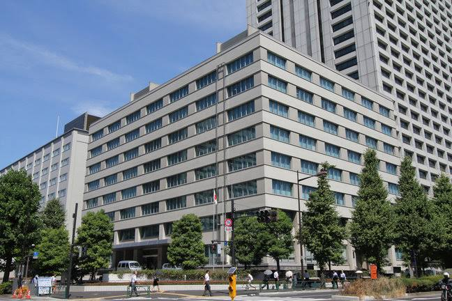 中央合同庁舎第五号館別館